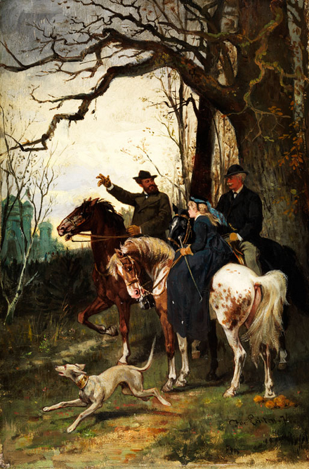 Am Waldessaum. Öl auf Holz. 25 x 16,5 cm. Rechts unten signiert und datiert „1874“. Verso alter Aufkleber mit Titelbezeichnung und damaliger Preisangabe „Zweihundertundfünfzig Thaler“ mit Adresse des Künstlers (Duisburger Str. 129, vgl. in Düsseldorf. Zwei Herren und eine Dame zu Pferde, begleitet von einem Weimaraner in abendlicher Stimmung.